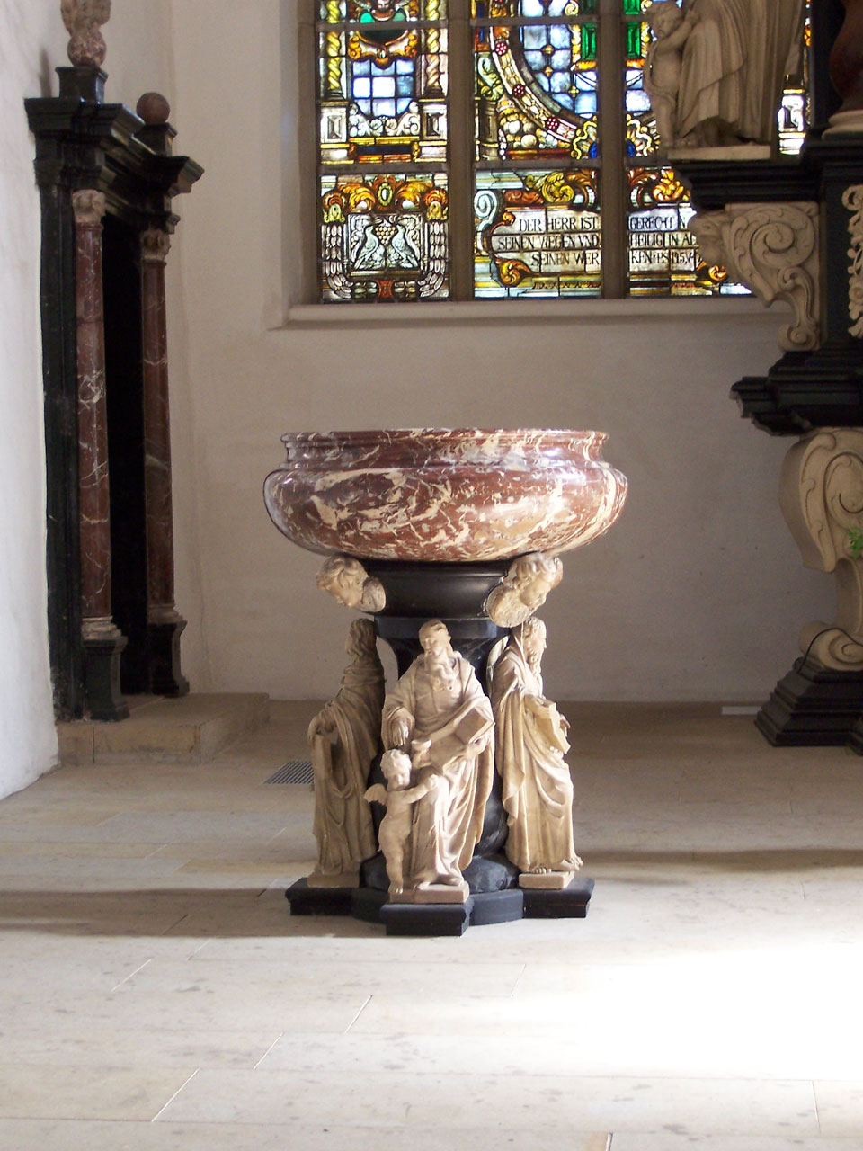 Stade, Kirche St. Cosmae (13.Jh), Taufbecken (1665) aus rotem und schwarzen Marmor, Figuren aus Alabaster (Meister unbekannt)